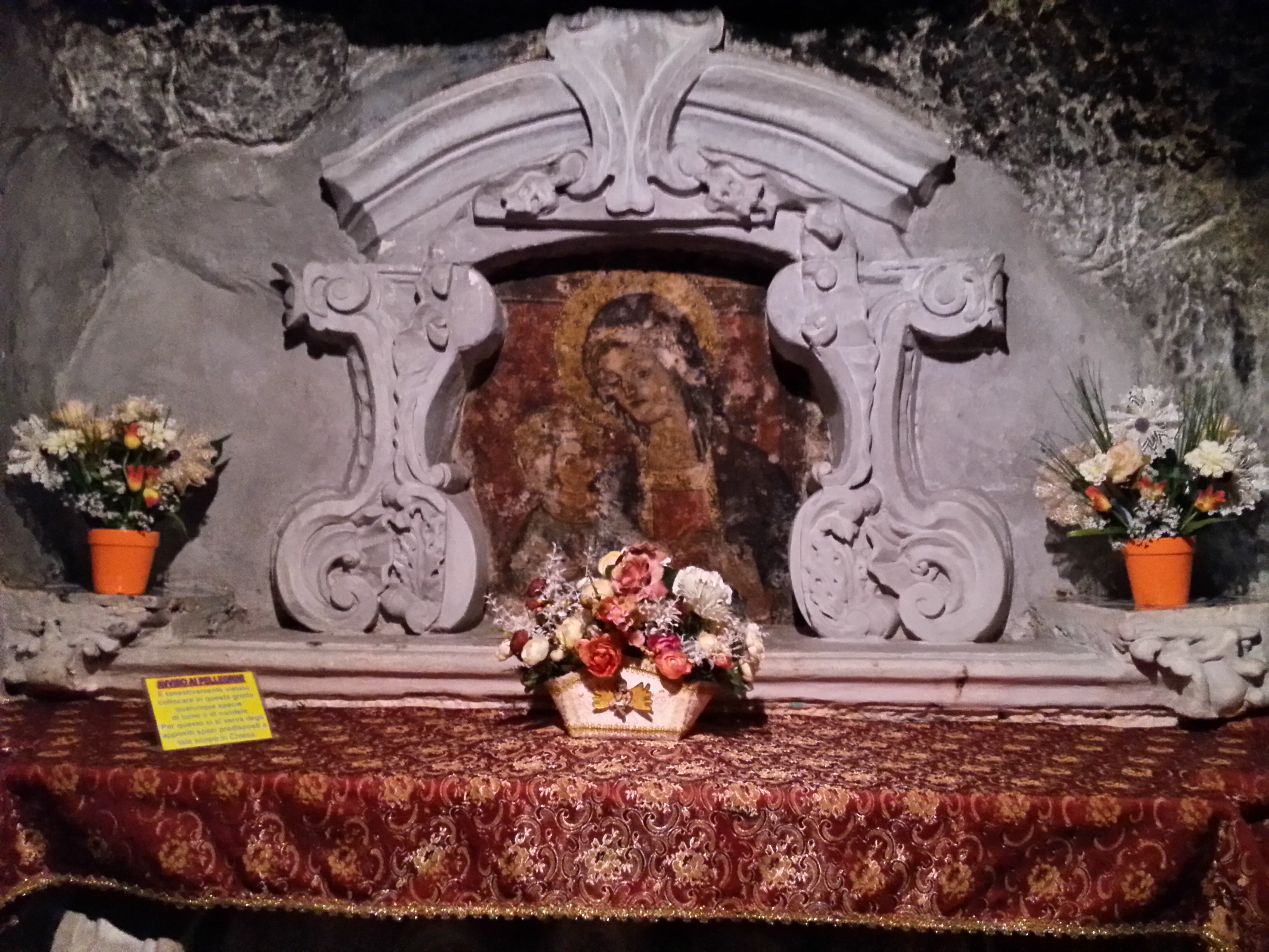 Dipinto della Madonna di Belvedere nella grotta